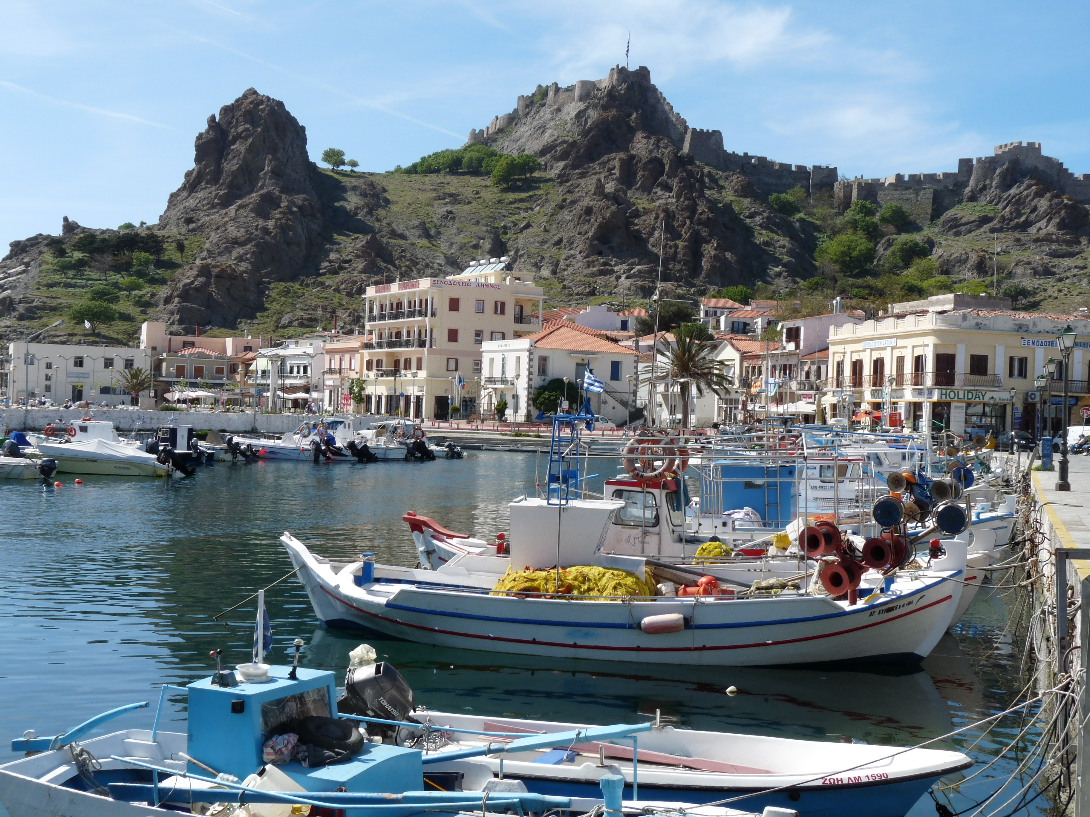 Lemnos fort